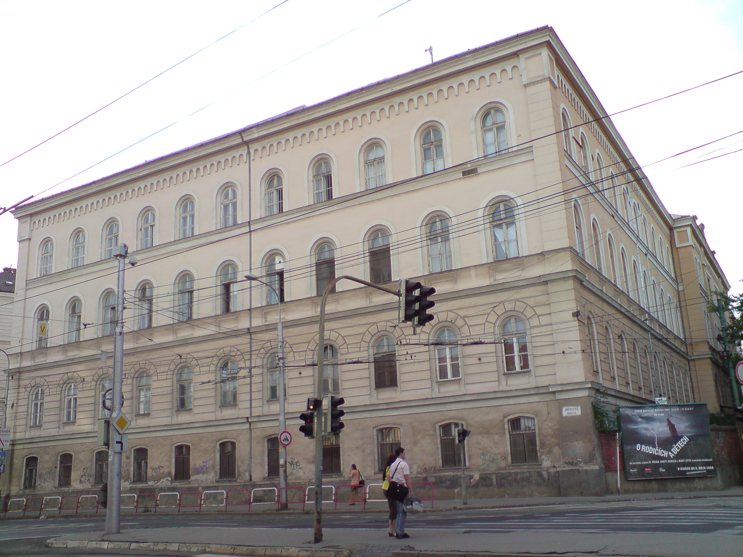 Nemocnica Miczkiewiczova